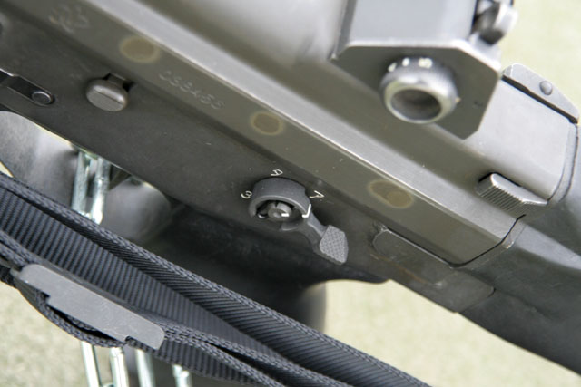 89式5.56mm小銃の左方切換えレバー 金沢駐屯地創立57周年記念行事にて